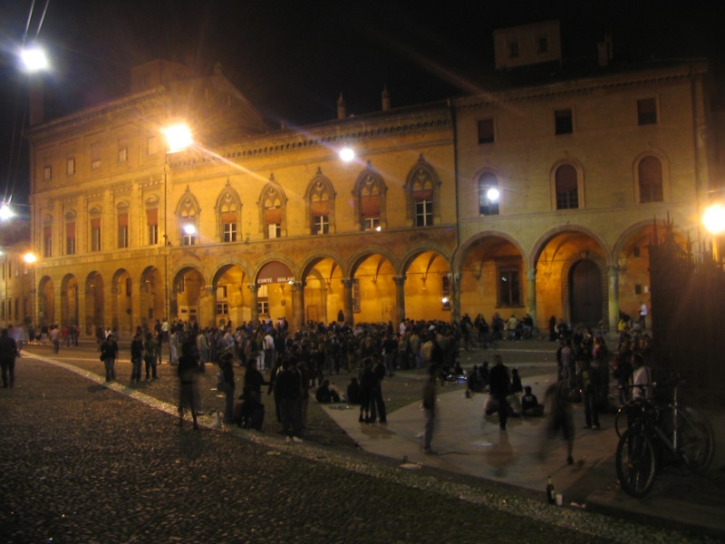 Bologna, Emila Romagna, Italia...